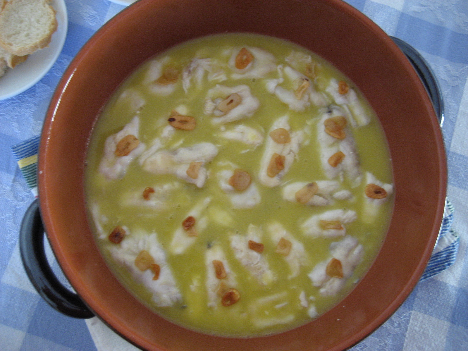 Cocotxas al pil pil